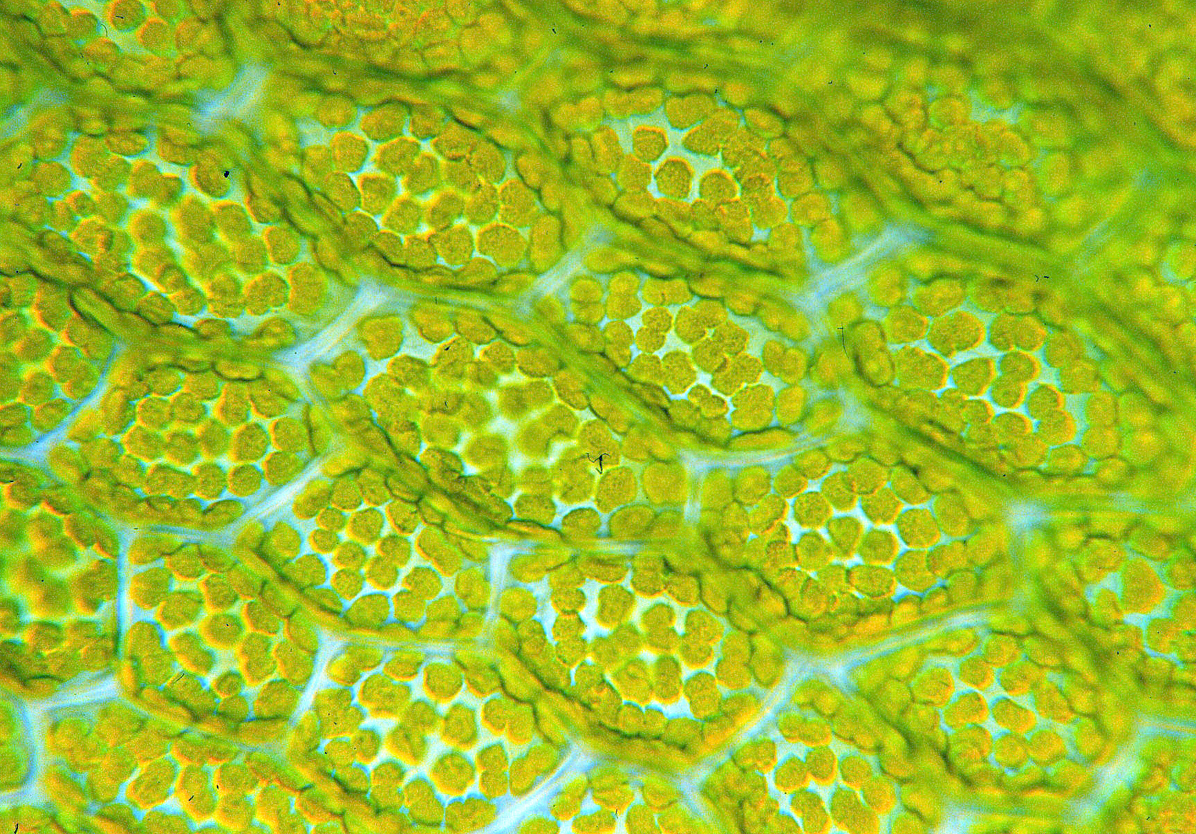 Blattgewebe von Mnium stellare mit Chloroplasten und Zellwand (optische Fokussierung auf die Chloroplasten). Zur Bezeichnung einzelner Elemente den Mauszeiger über das Bild bewegen (Notizfunktion).